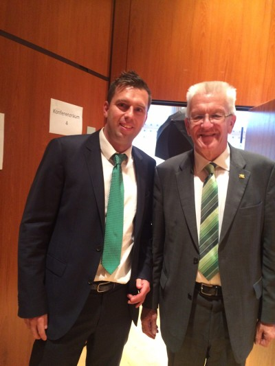 Landtagswahl Baden Württemberg